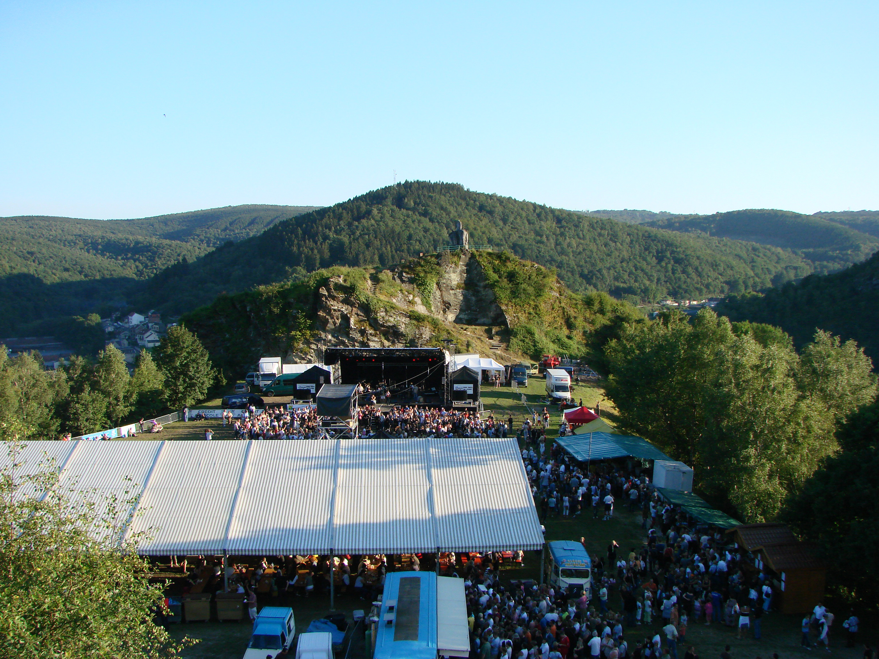 Aymon Folk Festival, vue d'ensemble du site: la platelle des quatre fils Aymon à Bogny-sur-Meuse.